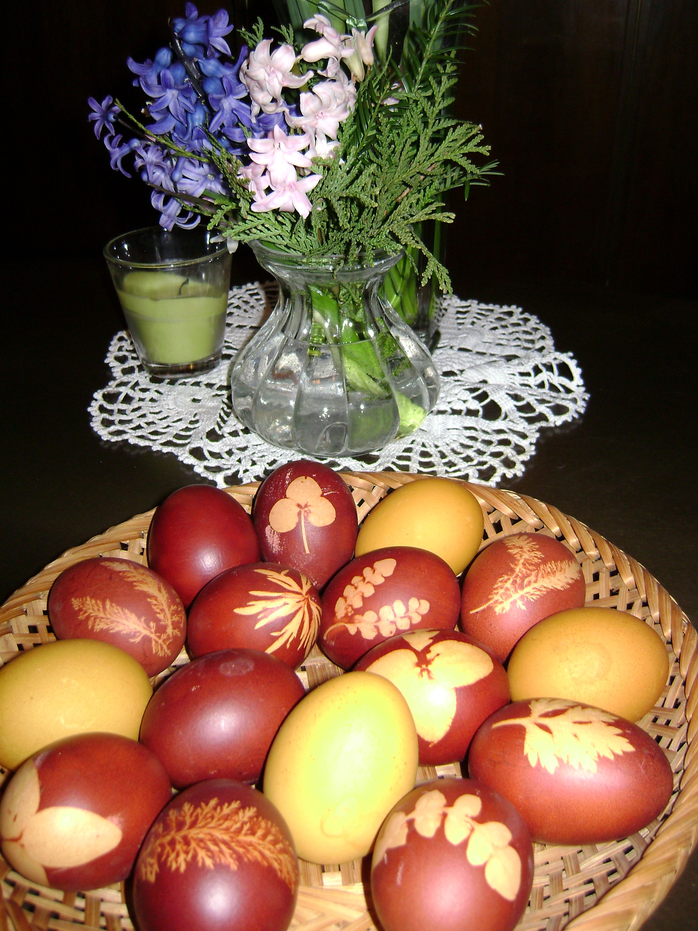 Hungarian Easter Eggs